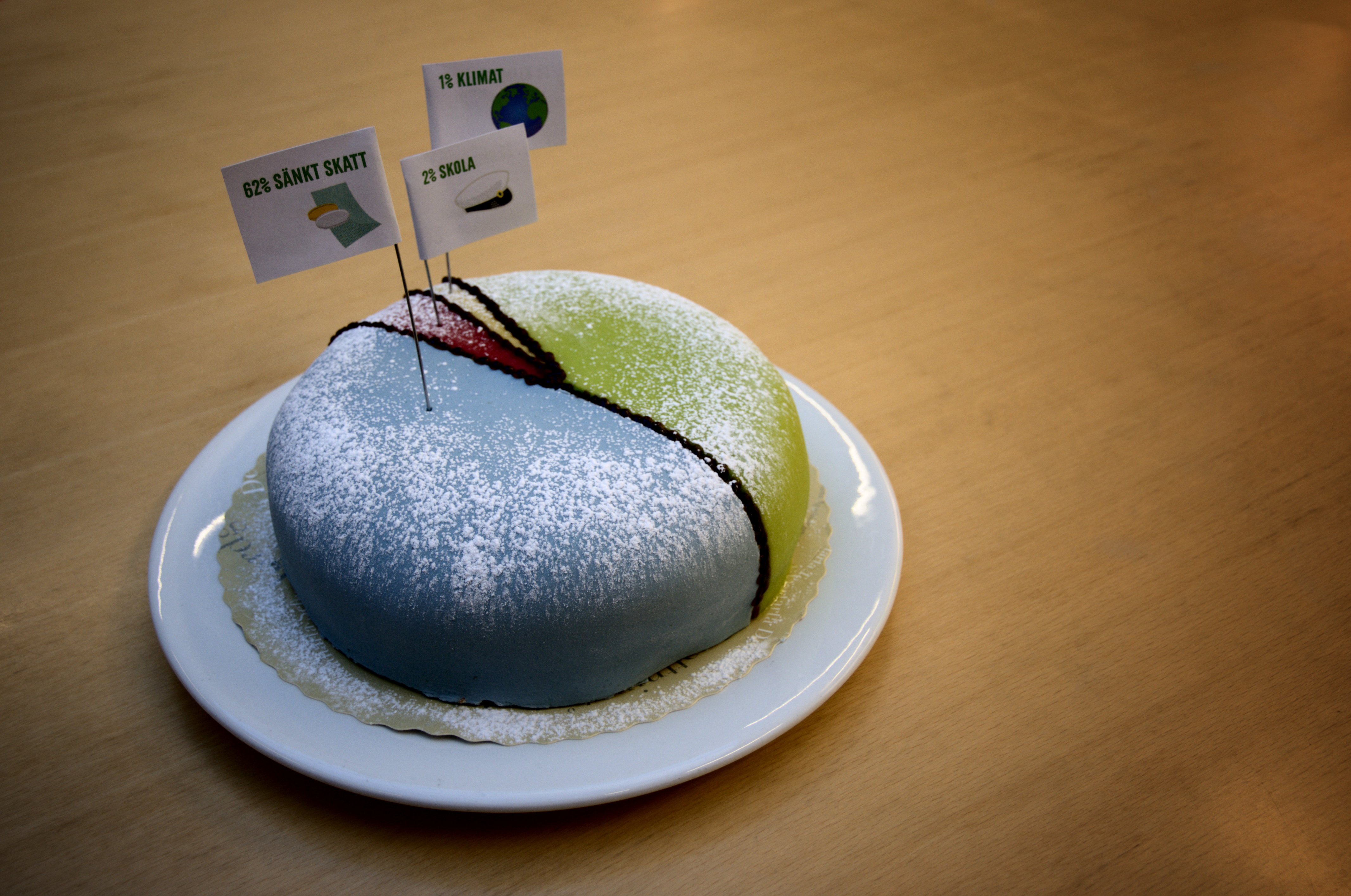 Tårtdiagram representerande Alliansregeringens användning av reformutrymmet, hösten 2012. 1 % till klimatet, 2 % till skolan och 62 % till skattesänkningar.